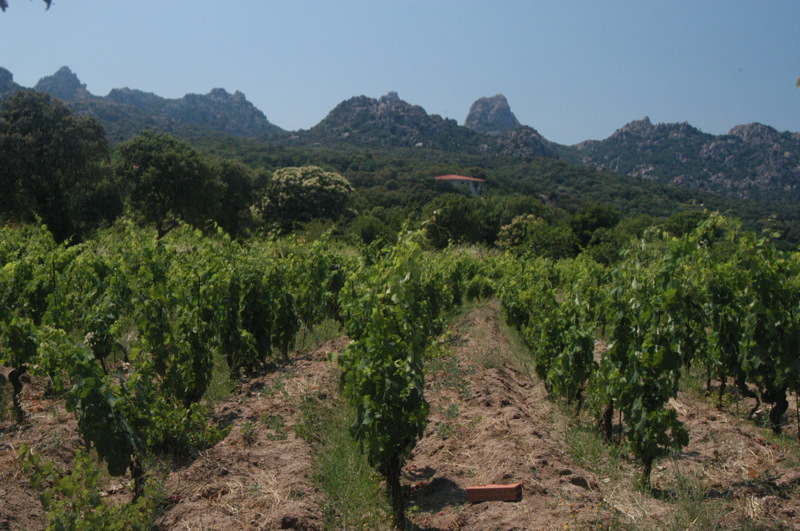 vineyard at Aggius